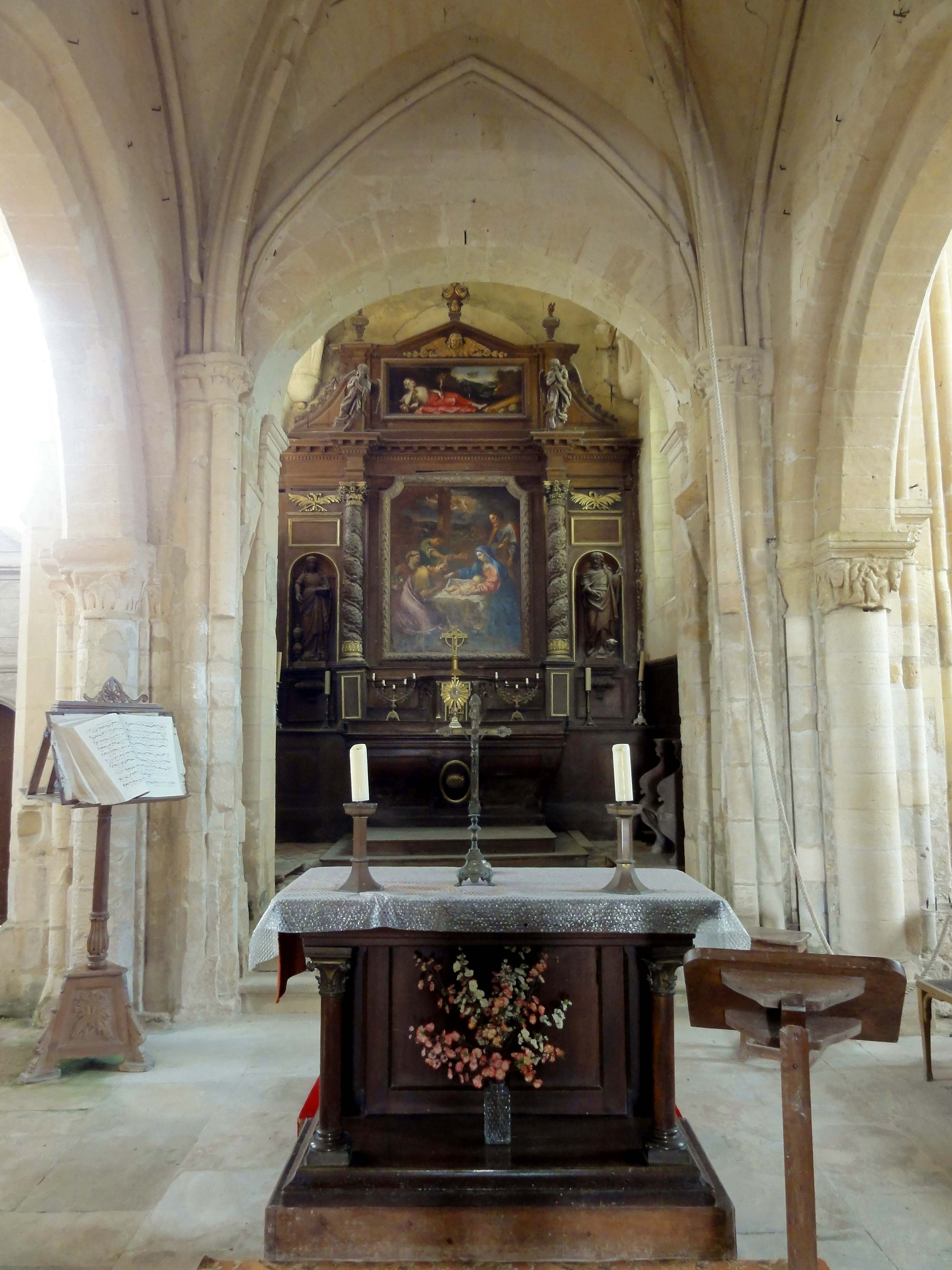 Intérieur de l'église (voir titre).